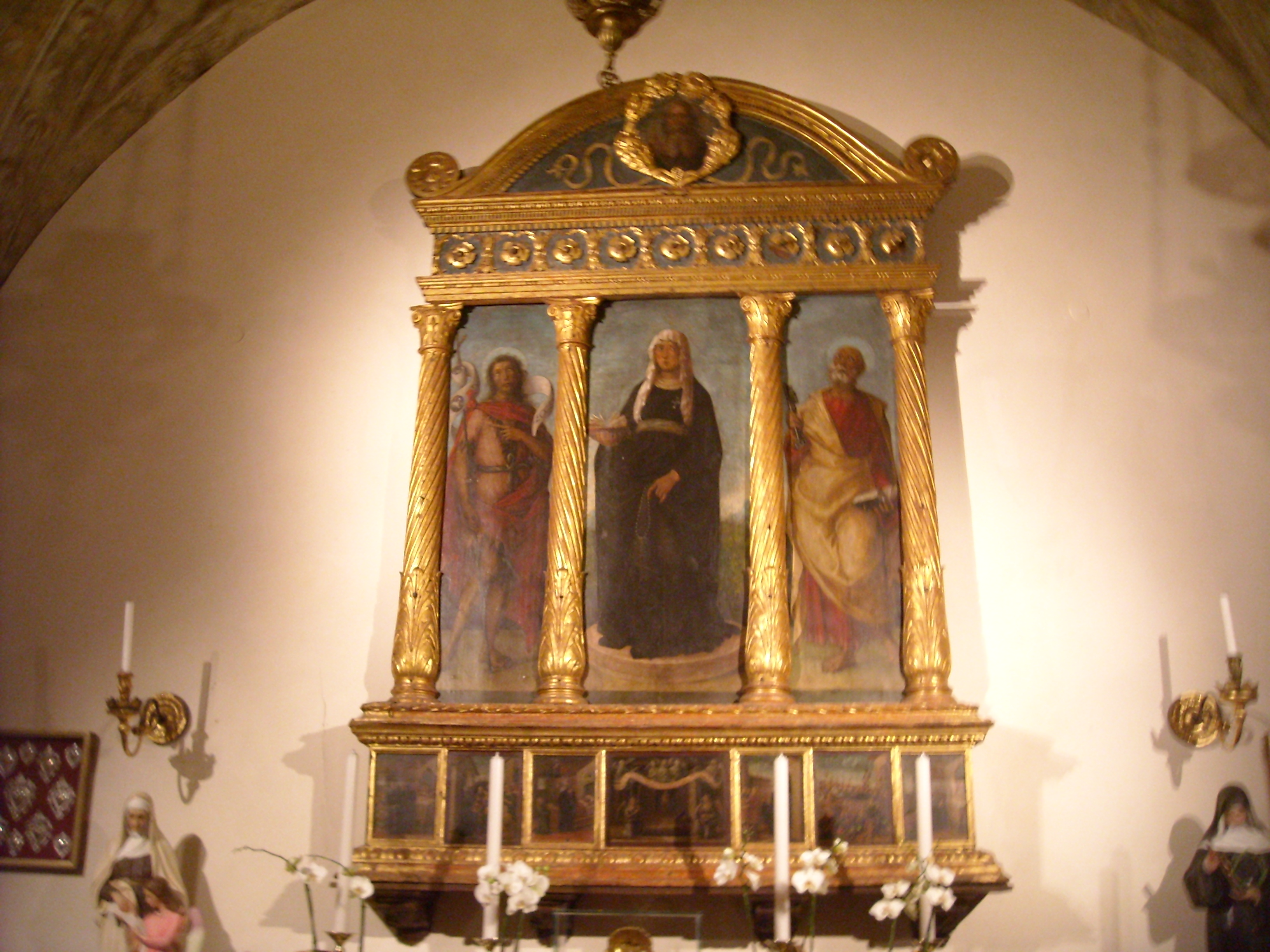 Ttrittico nella navata sinistra della chiesa di Santa Toscana, a Verona